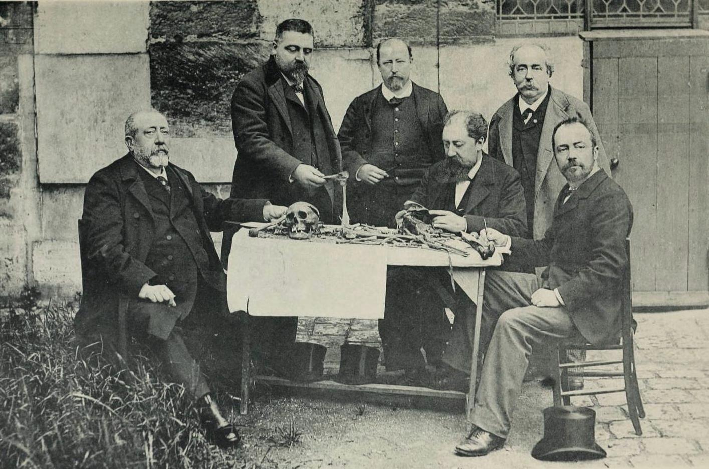 De gauche à droite : Dr. Émile Magitot (membre de l'Académie de médecine, ancien président de la Société d'anthropologie) ; Dr. Félix de Backer (directeur de la Revue de l'antisepsie) ; Quétin (dessinateur) ; Dr. Marceau Bilhaut (chirurgien des enfants de l'Hôpital international) ; Jules Talrich (mouleur) ; Dr. Léonce Manouvrier (professeur à l’École d'anthropologie, secrétaire-général-adjoint de la Société d'anthropologie).Sur la table : Ossements d'un jeune homme, déjà exhumés en 1846, et autrefois attribués à tort à Louis XVII (1785-1795).